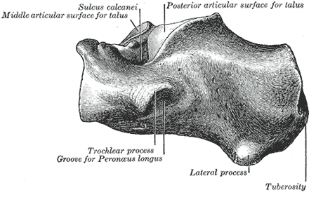 FIG. 266– Left calcaneus, lateral surface.